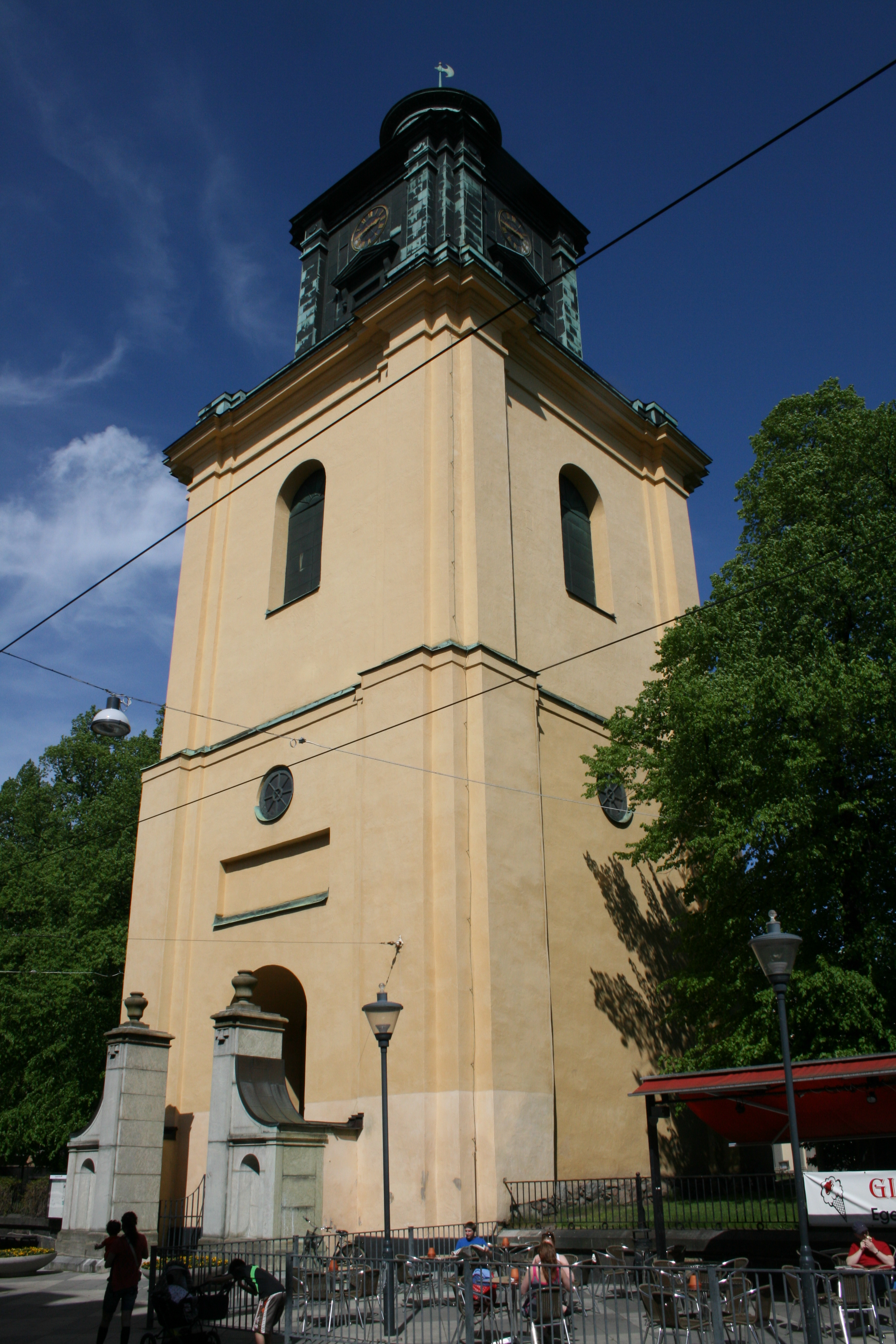 Stadstornet, S:t Olai kyrkas klocktorn, Norrköping